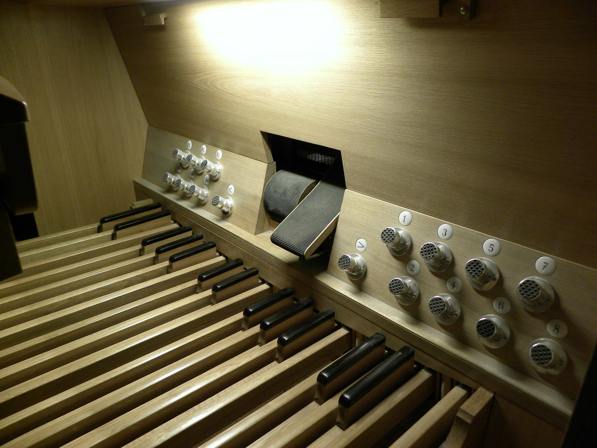 Wałek crescendowy i pedał szafy żaluzjowej